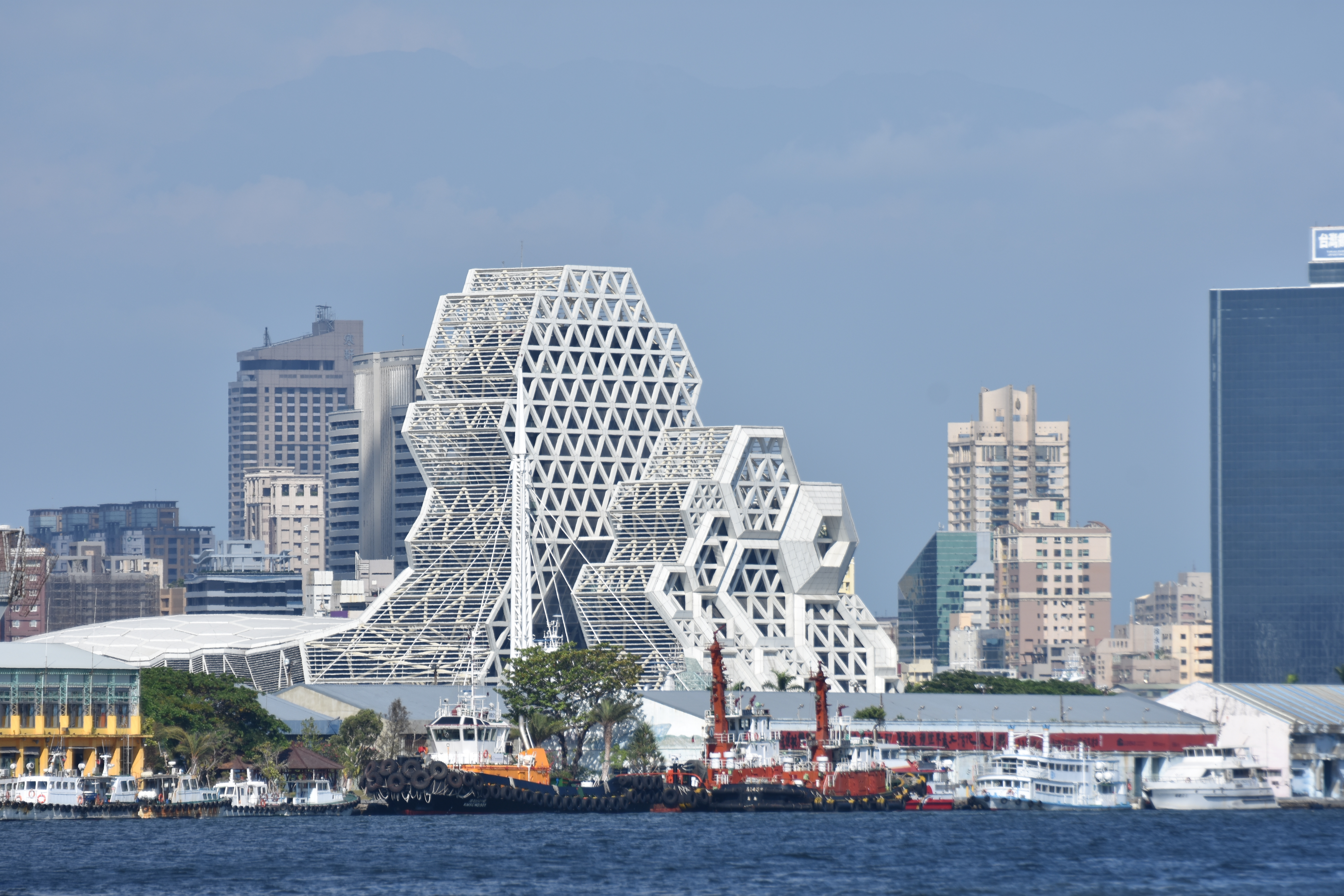 中文（台灣）: 高雄流行音樂中心